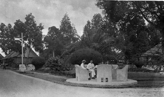 Foto. Een bankje in het "v.Limburg Stirum Park" langs de weg van Tandjoengradja naar Palembang, augustus 1926